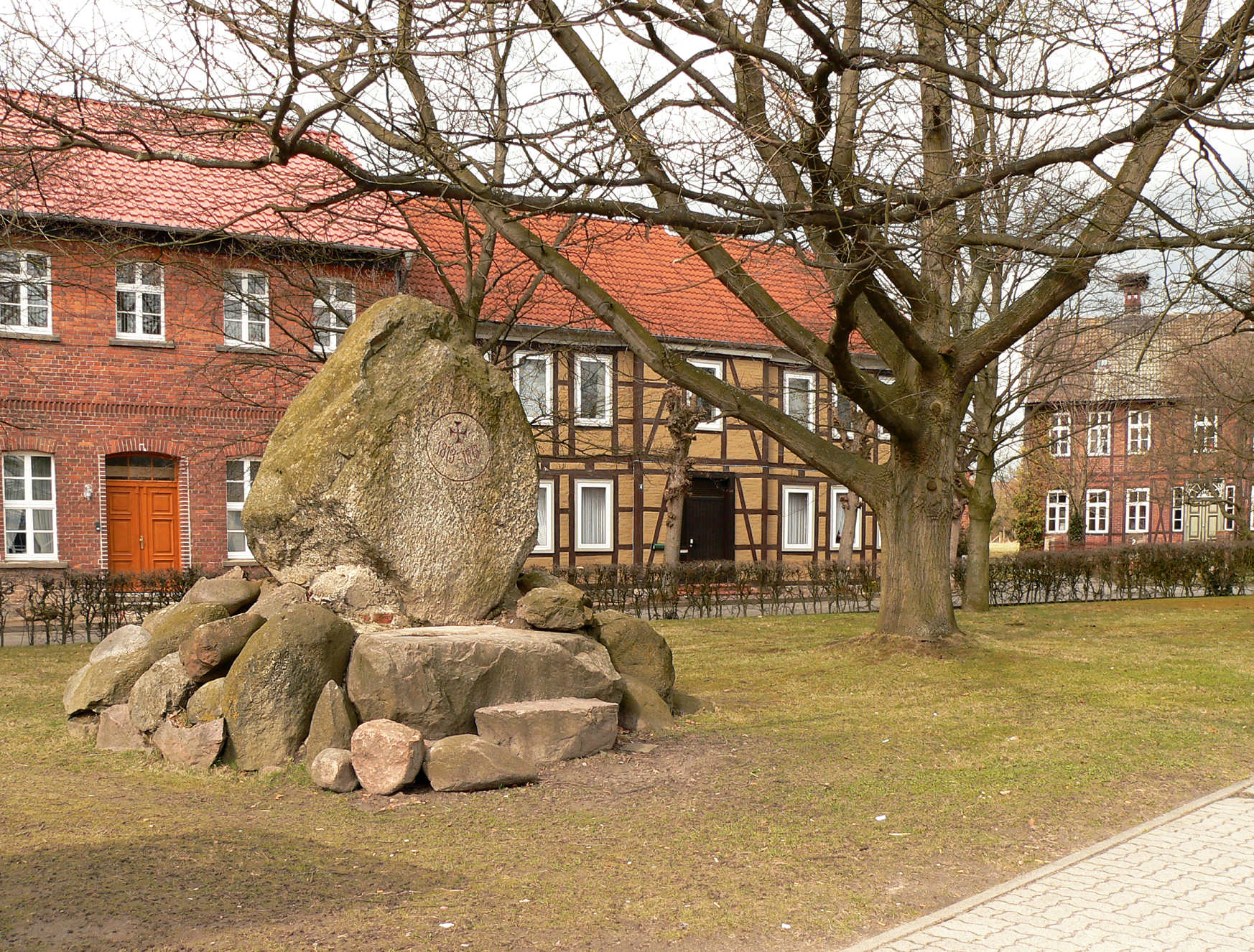 Rühen - Denkmal im Dorfzentrum im Inneren des Rundlings